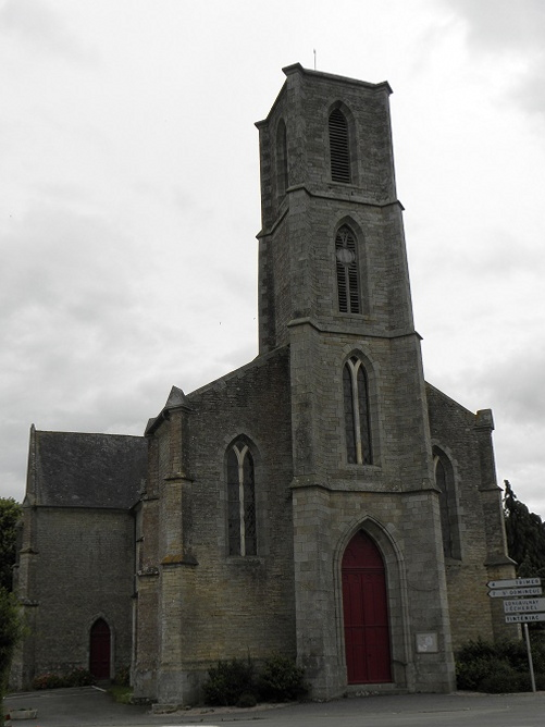 Façade occidental et flanc nord de l'église de la Sainte-Trinité de Saint-Thual (35).